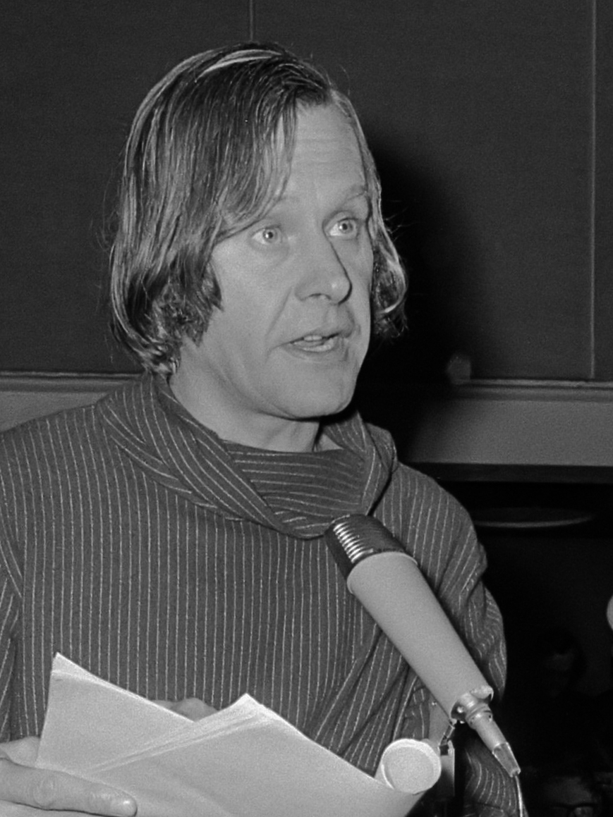 PPR-congres in Wageningen, nieuwe PPR-voorzitter Wouter van Dam spreekt 10 februari 1973